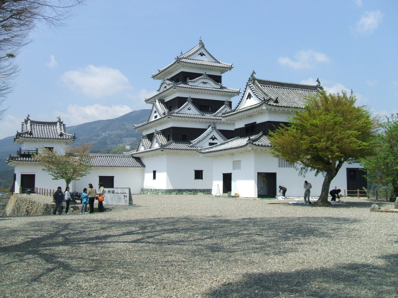 Ozu castle in Ehime Japan愛媛県大洲市にある==大洲城天守建築群（本丸にて）